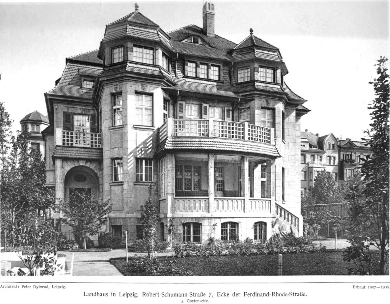 Die Villa für Kunsthistoriker und Privatgelehrten Dr. phil. Ulrich Thieme in Leipzig, auf dem Eckgrundstück Robert-Schumann-Straße 7 / Ferdinand-Rhode-Straße (dort ohne Hausnummer) im Musikviertel, wurde 1907-1908 nach Entwurf des Leipziger Architekten Peter Dybwad erbaut. (Ansicht der Gartenseite)